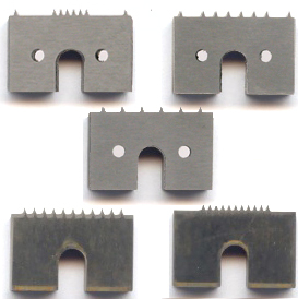 Ruitjesproefmessen